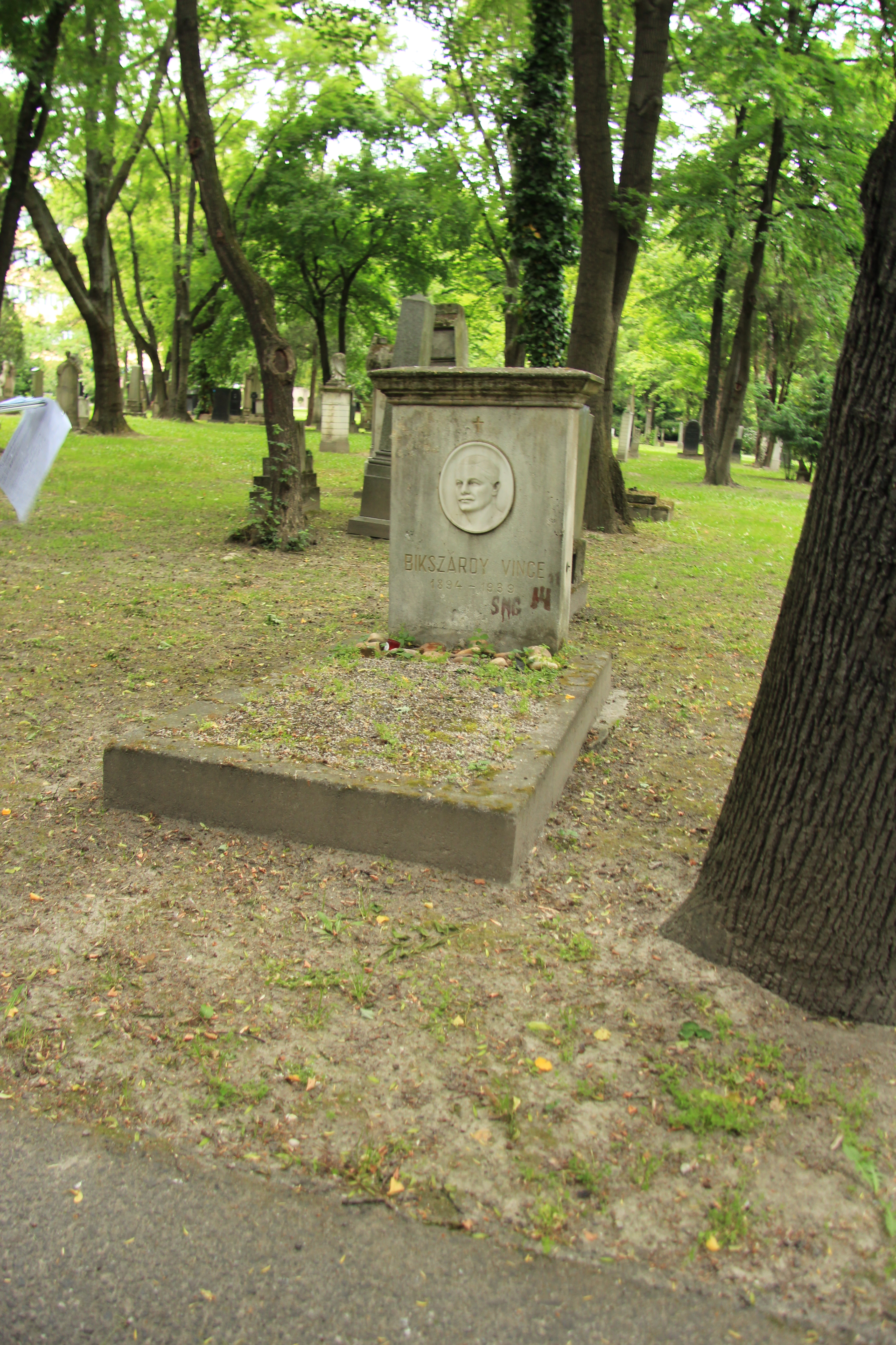 Grabstele mit Medaillon von Vincent Bikszárdy